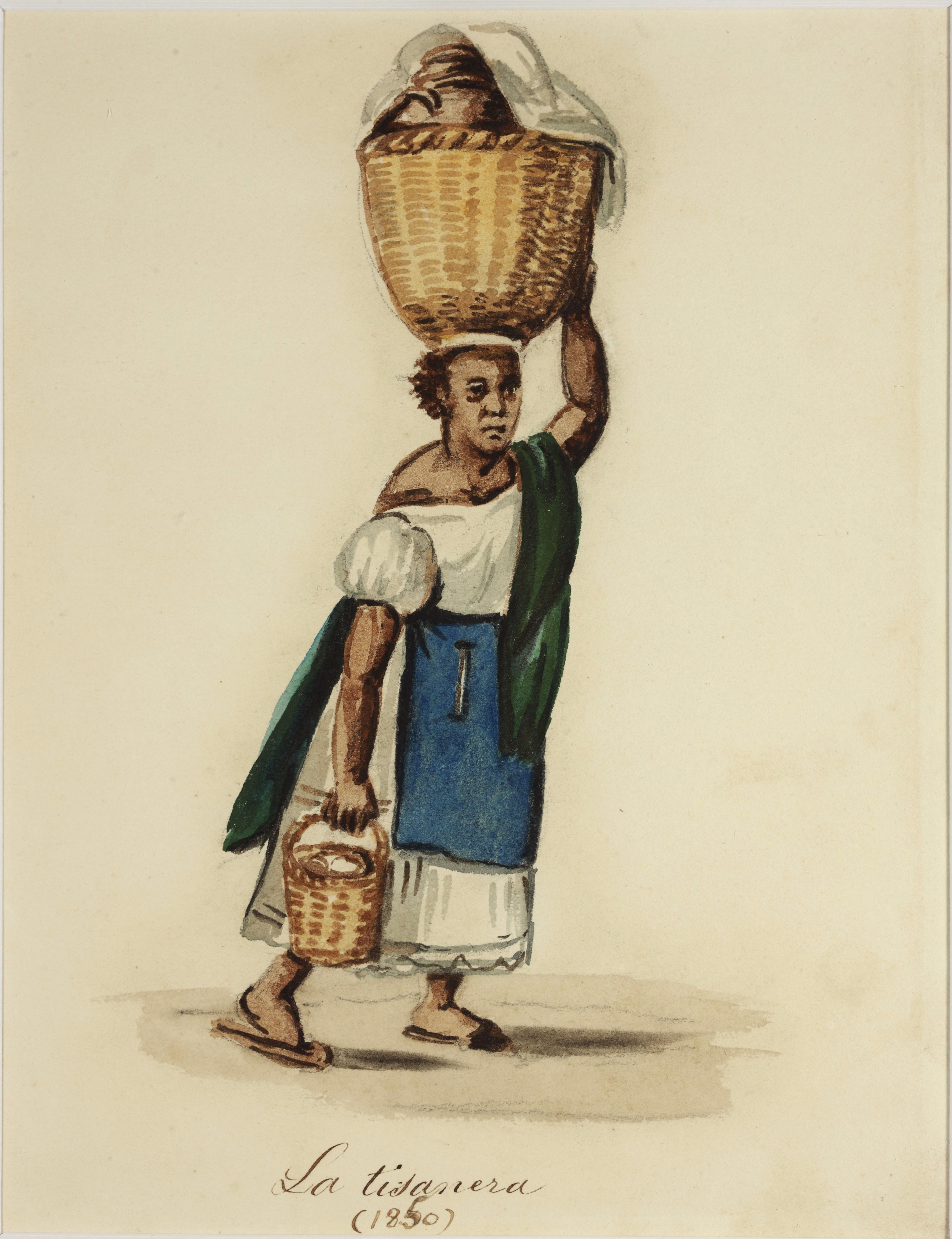 Acuarela de Pancho Fierro (Lima, 1807 - Lima, 1879)